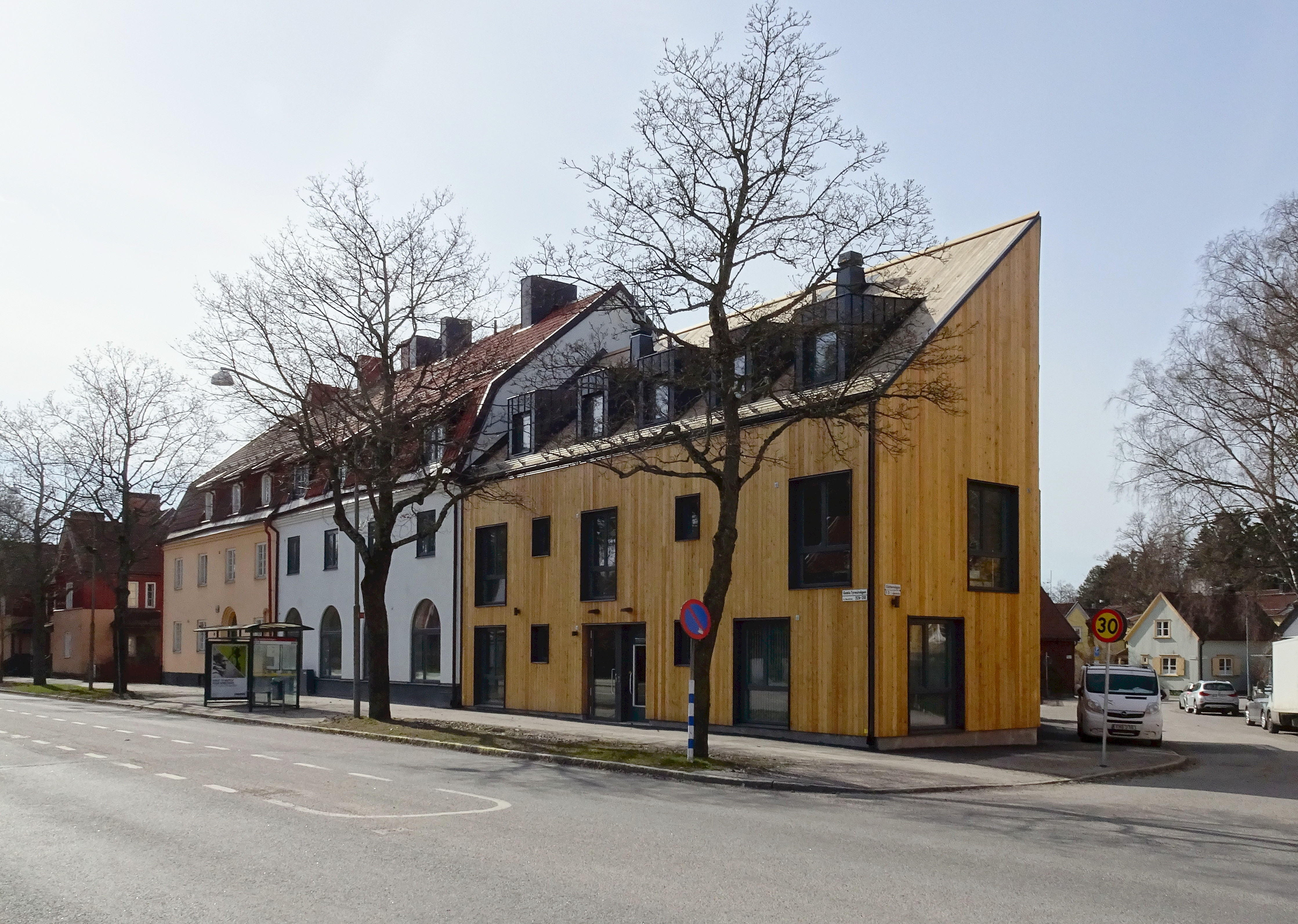 Fastigheten Modellvillan 21, Gamla Tyresövägen 310, Enskededalen